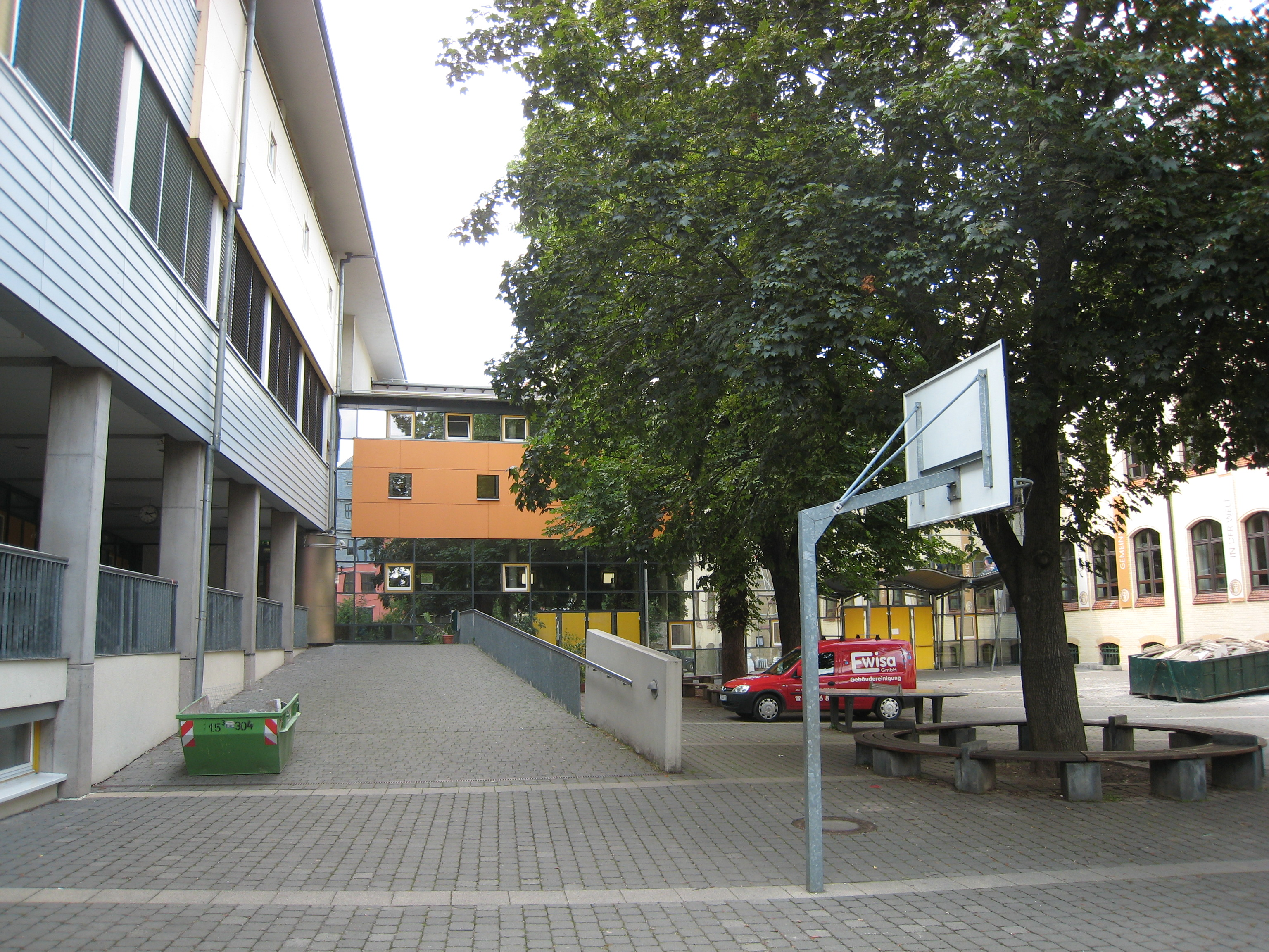 Edith-Stein-Schule Erfurt 5